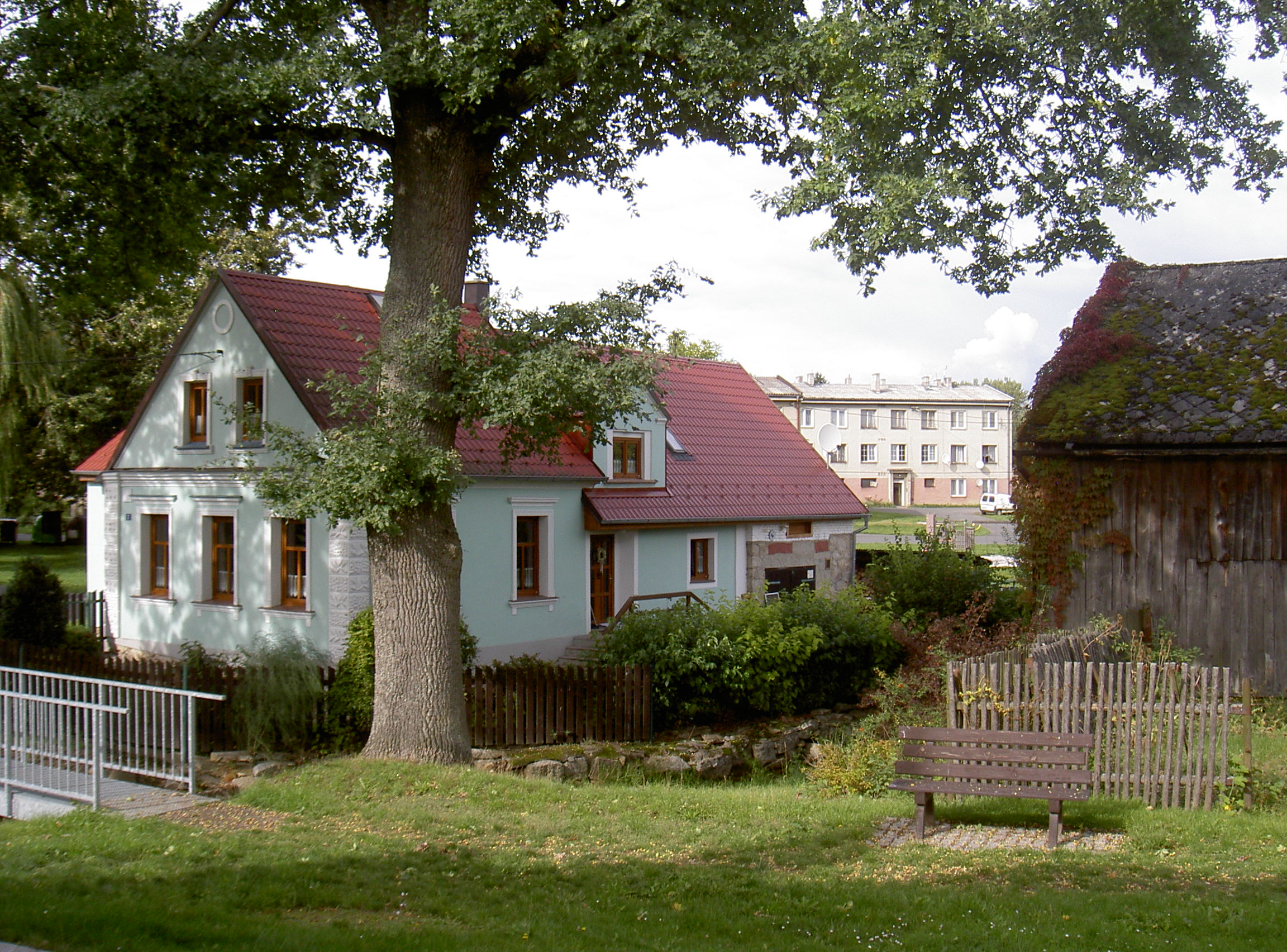 Třískolupy pod Přimdou